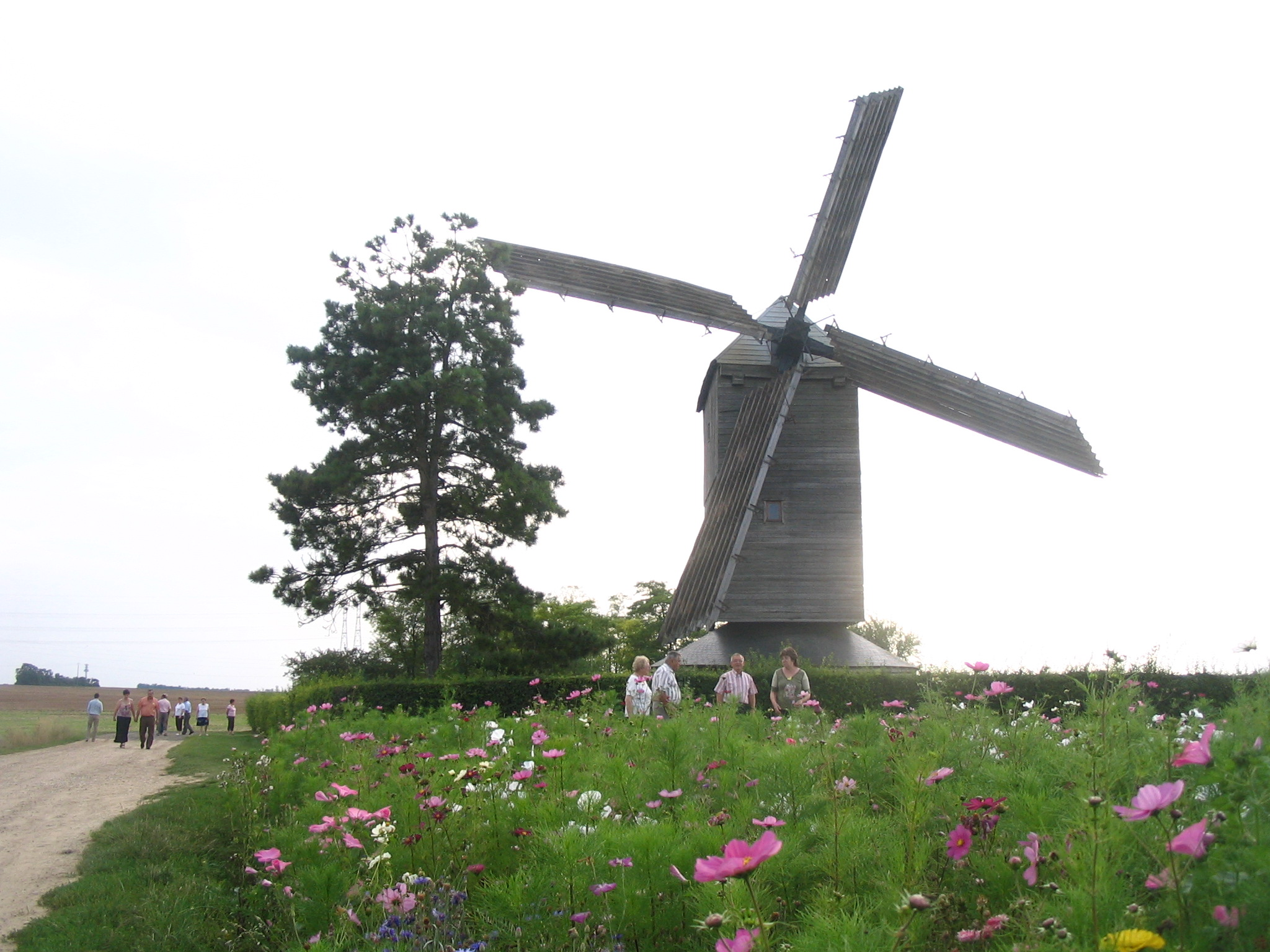 Moulin pivot de Beauce. Moulin de la Garenne d'Ymonville (Eure-et-Loir)